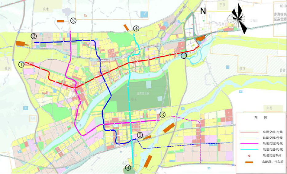 洛阳市城市轨道交通全网